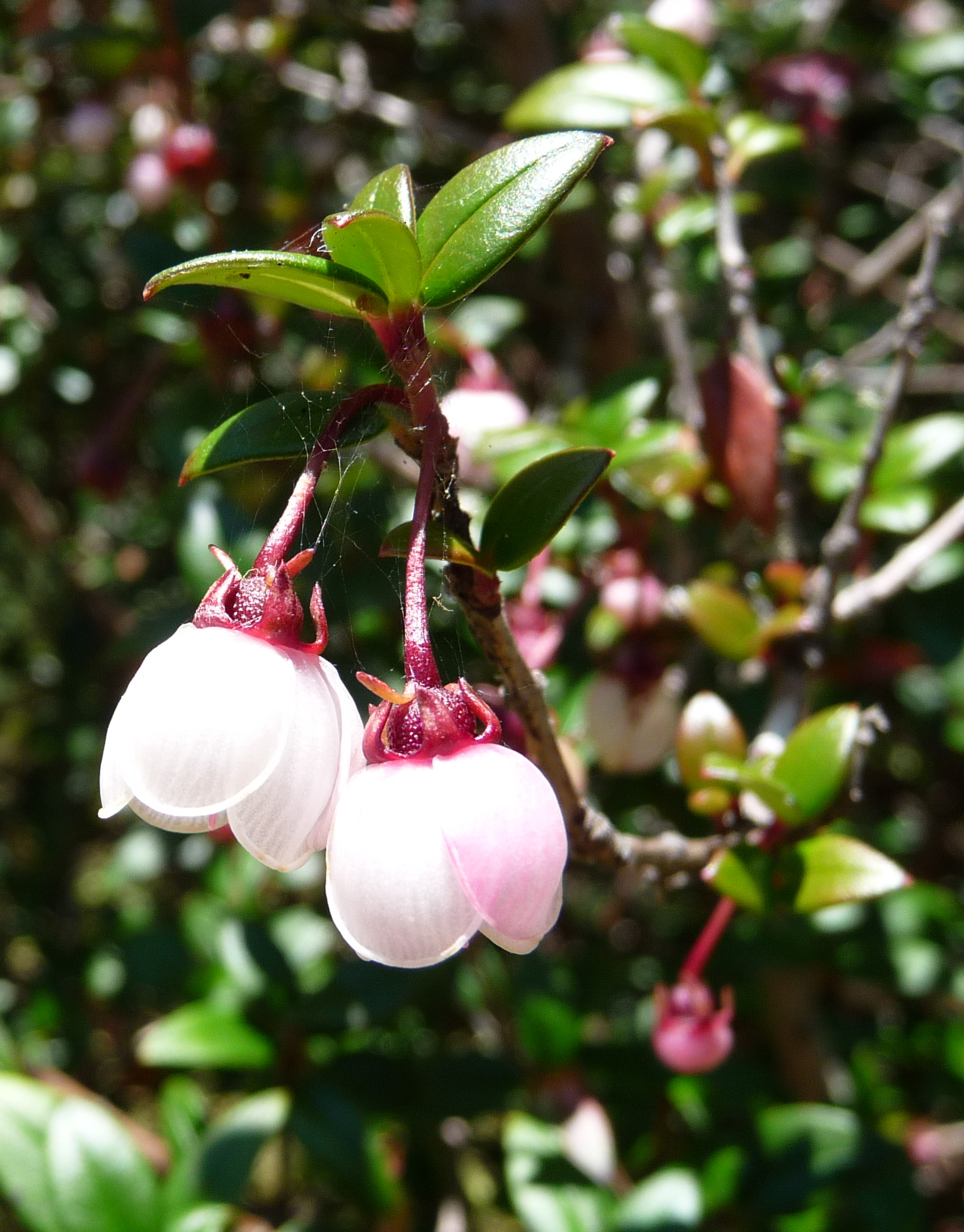 Fleurs du goyavier du Chili (Murta, Ugni molinae). Photographiée début janvier 2013 au Parque del Bosque, Valdivia, Chili.